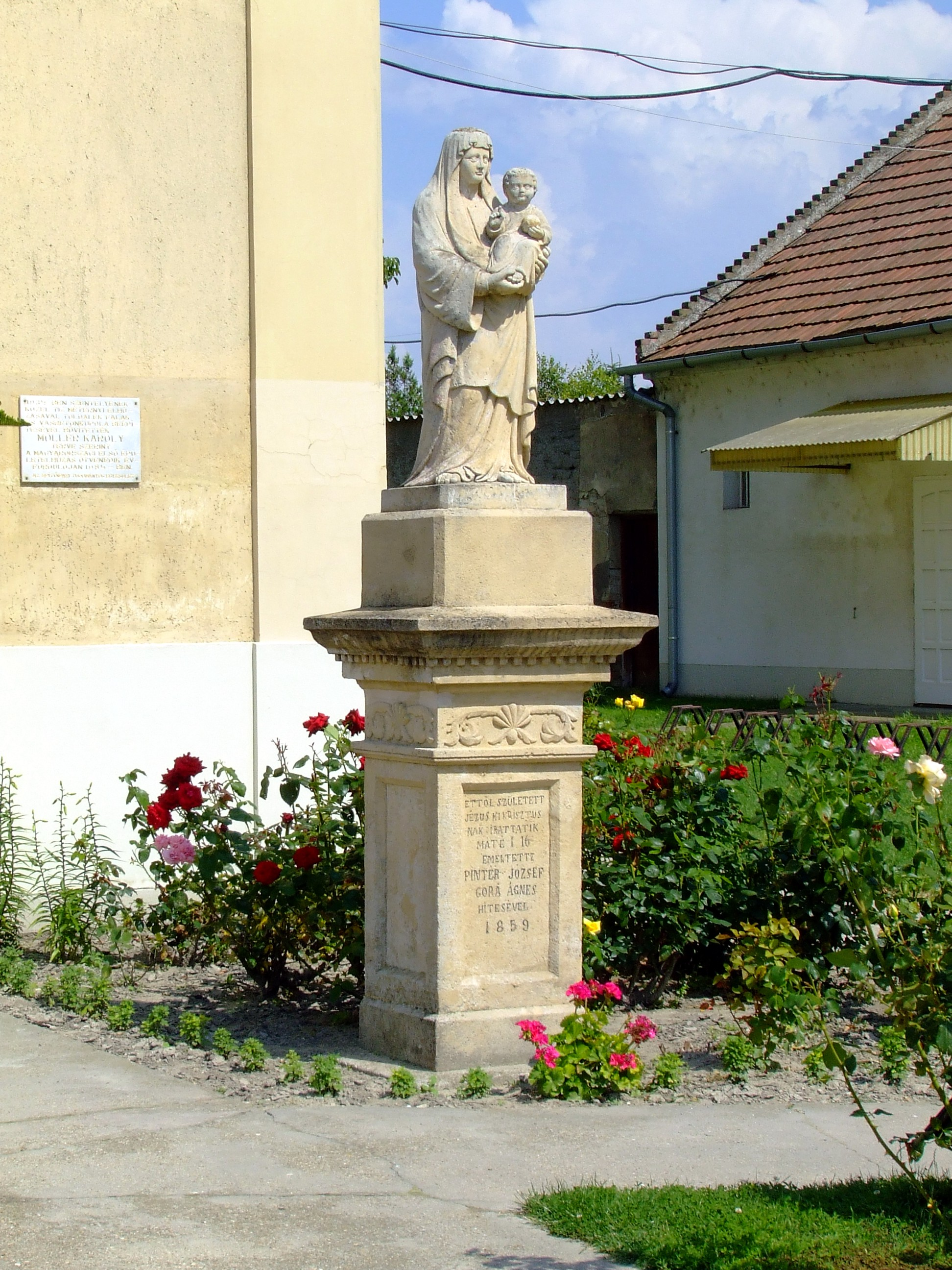 Szobor a dunapataji Magyarok Nagysszonya-templom előtt (1859)